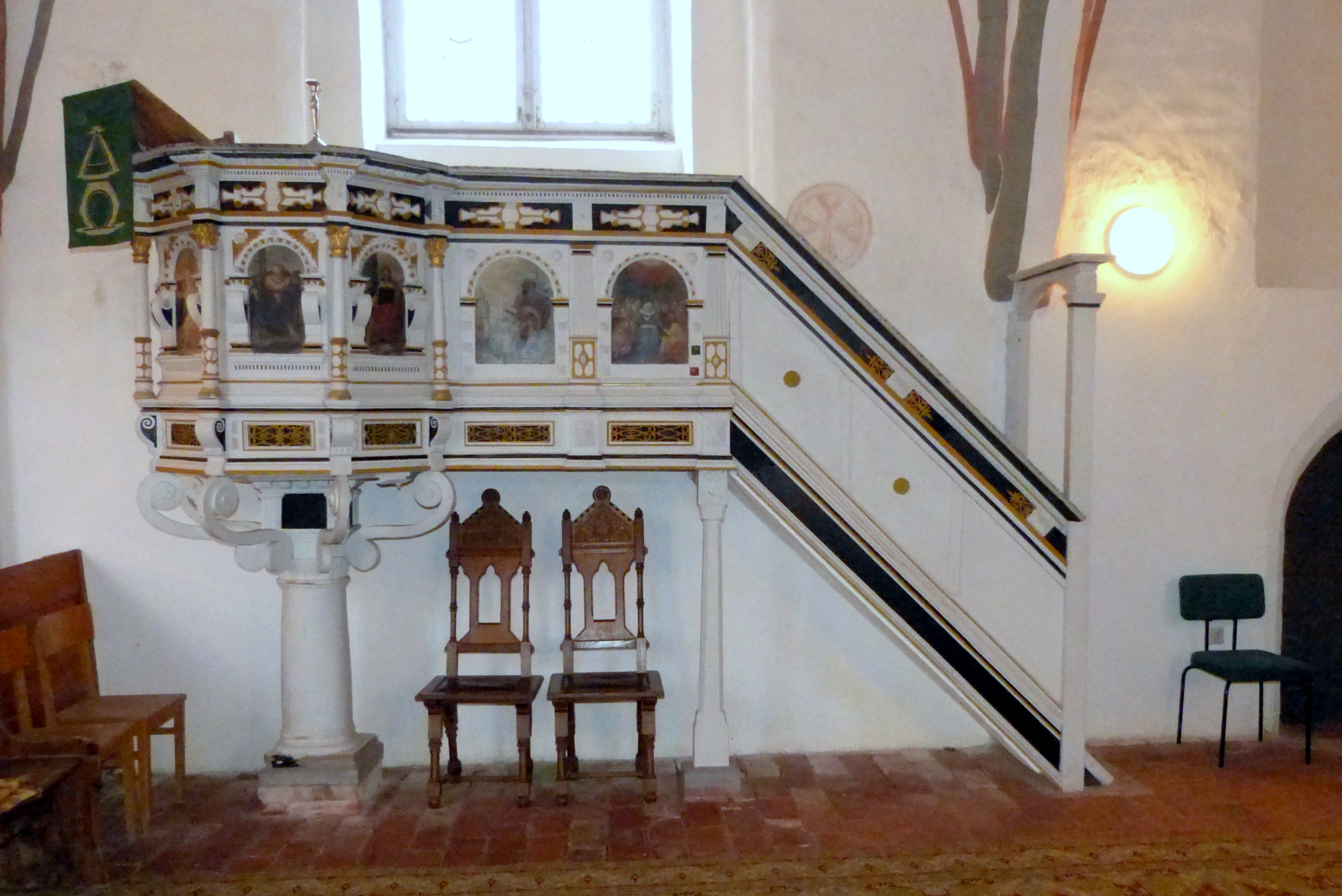 Kanzel in der Kirche in Krien